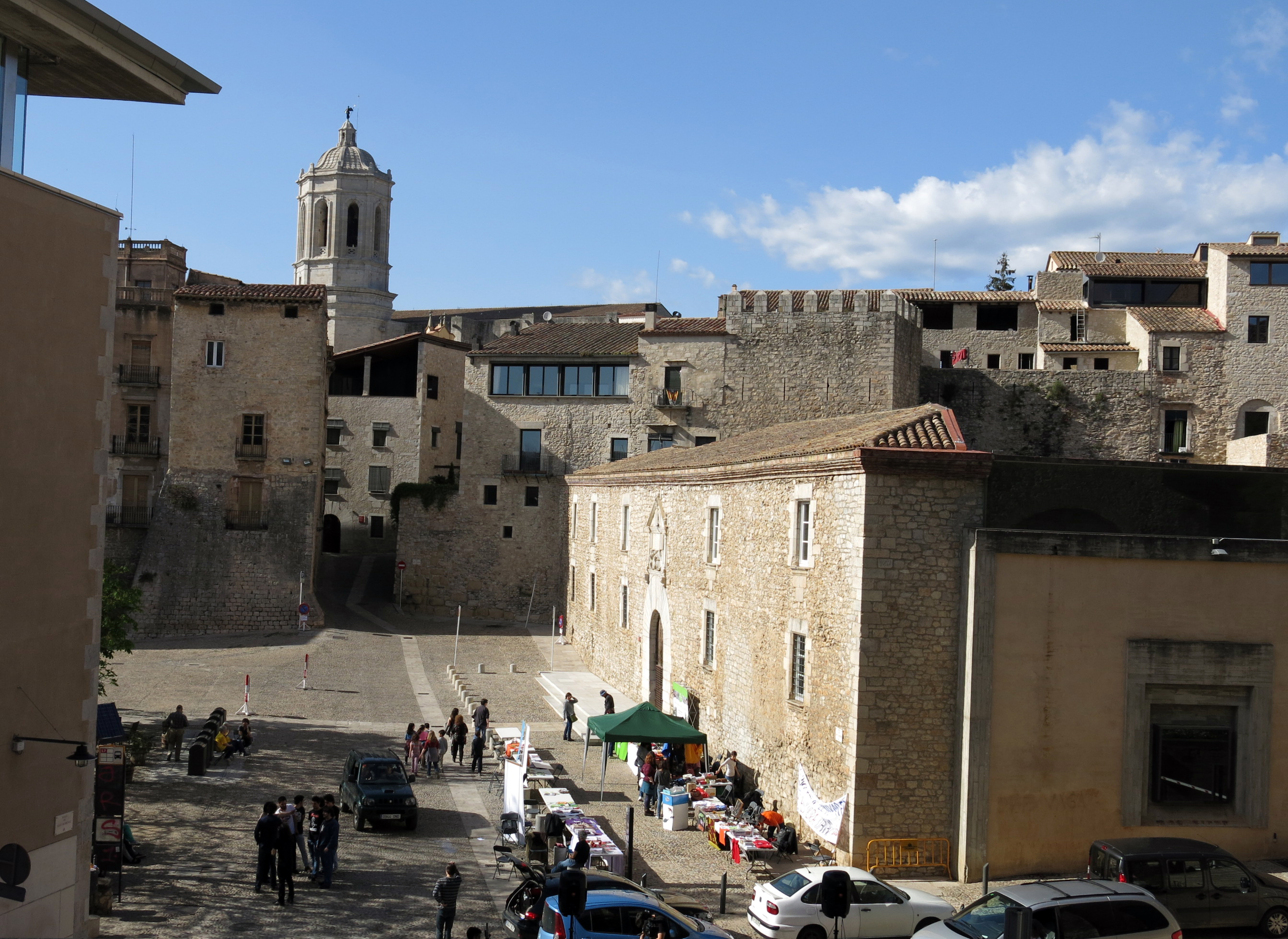 Les Àligues (Girona)